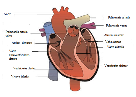 Širdies sandara -pavadinimai lotynų k